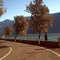 Il vecchio Lungolago nei pressi del porto (1990)